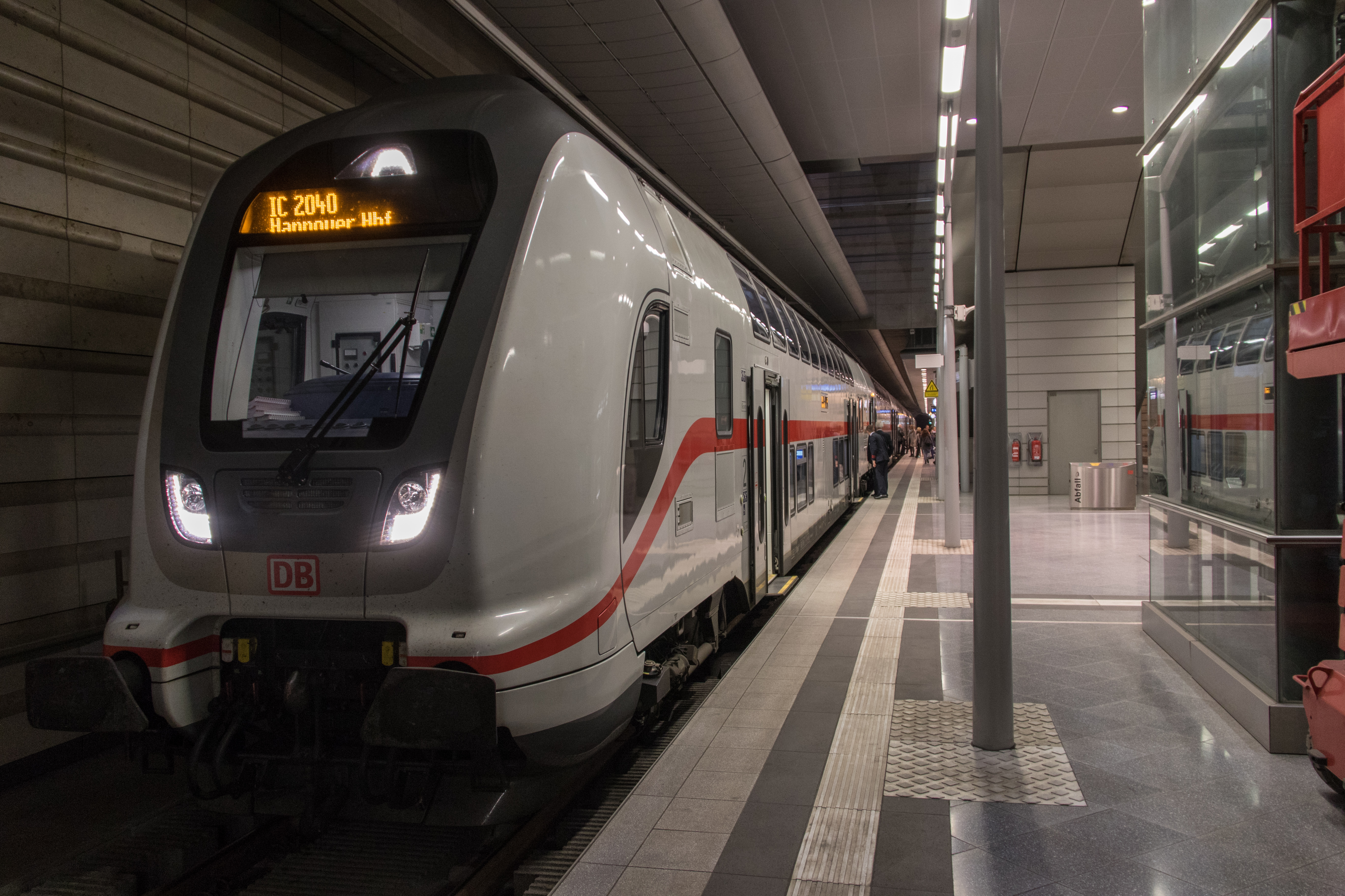 Bombardier Twindexx im Leipziger City-Tunnel